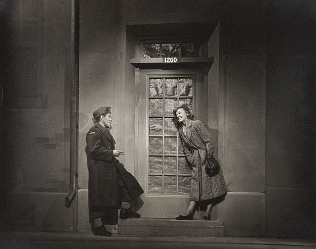 Scène à l'extérieur de la maison avec Gratien Gélinas (Tit-Coq) et Muriel Guilbault (Marie-Ange) dans la pièce Tit-Coq